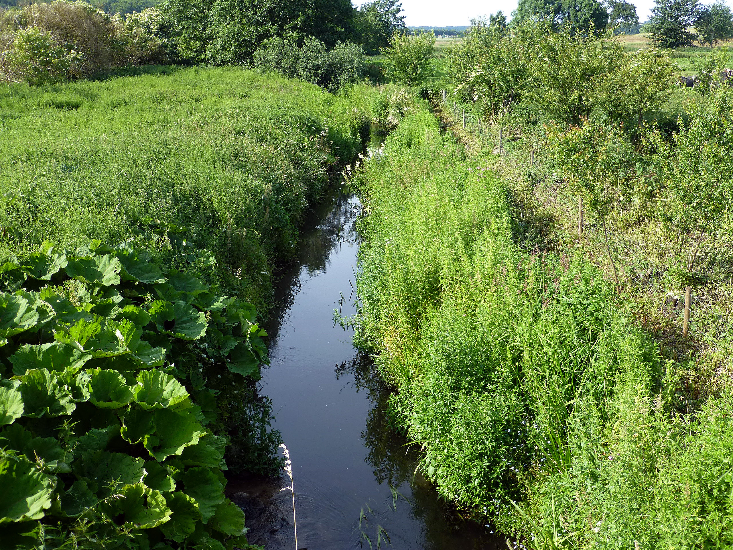 Åkær Å ved Vads Mølle bro